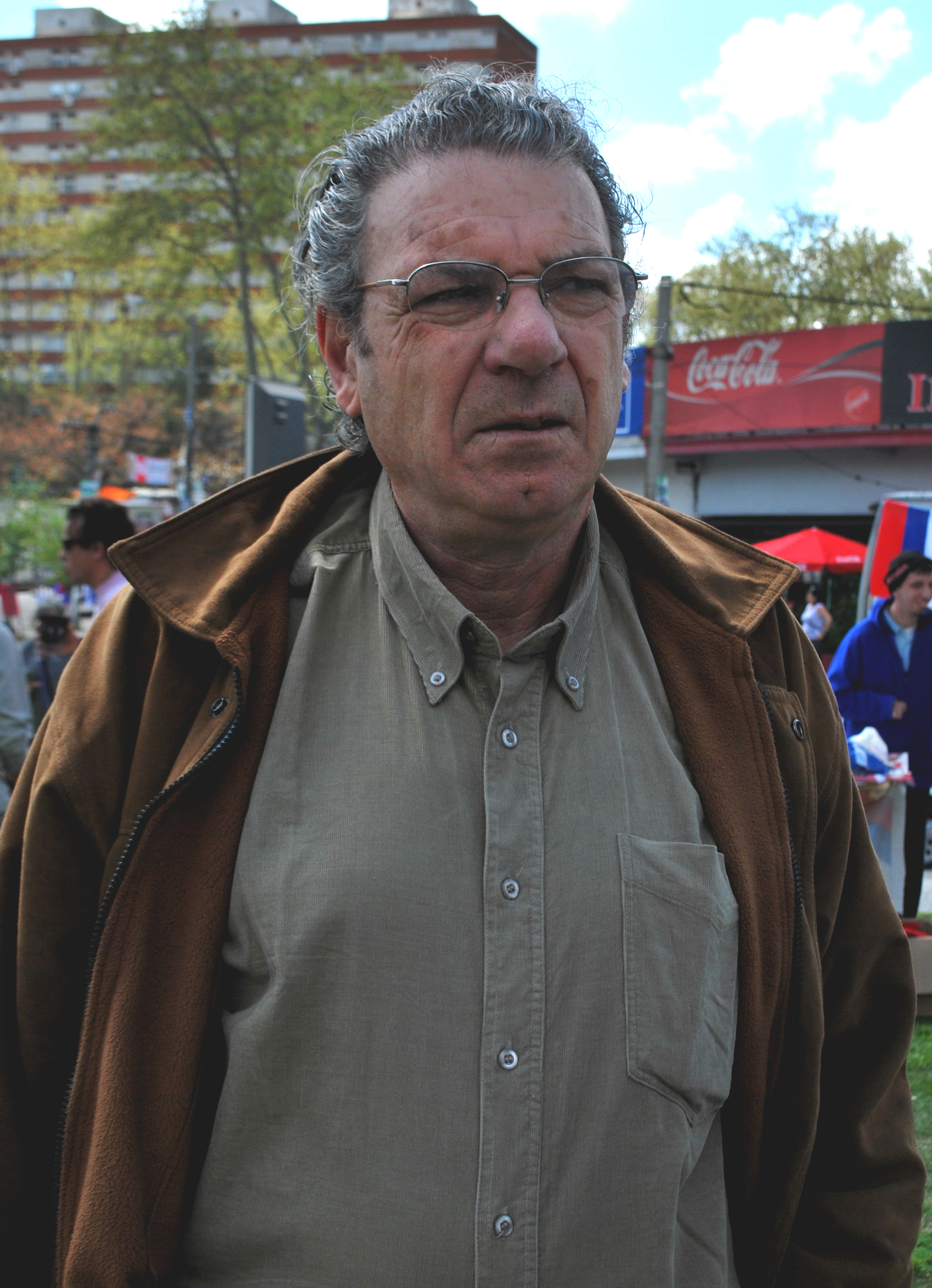 Fotografía del economista y político del Frente Amplio, Héctor Tajam, en un acto de campaña de cara a las elecciones de octubre de 2009.